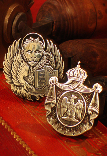 Outils Fers à Dorer